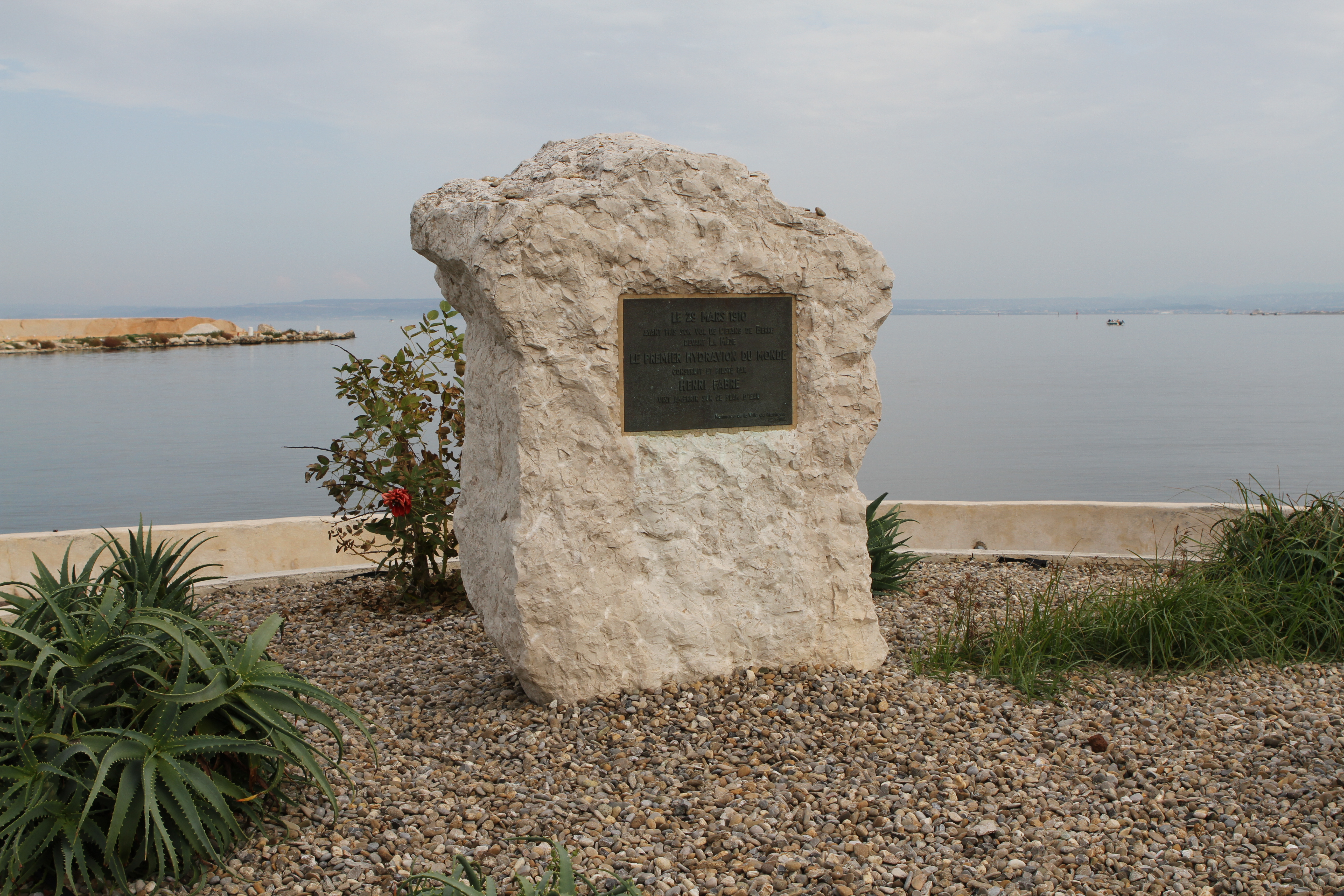 Plaque commémorative du 1er vol mondial en hydravion d'Henri Fabre, Martigues (Bouches-du-Rhône, France)